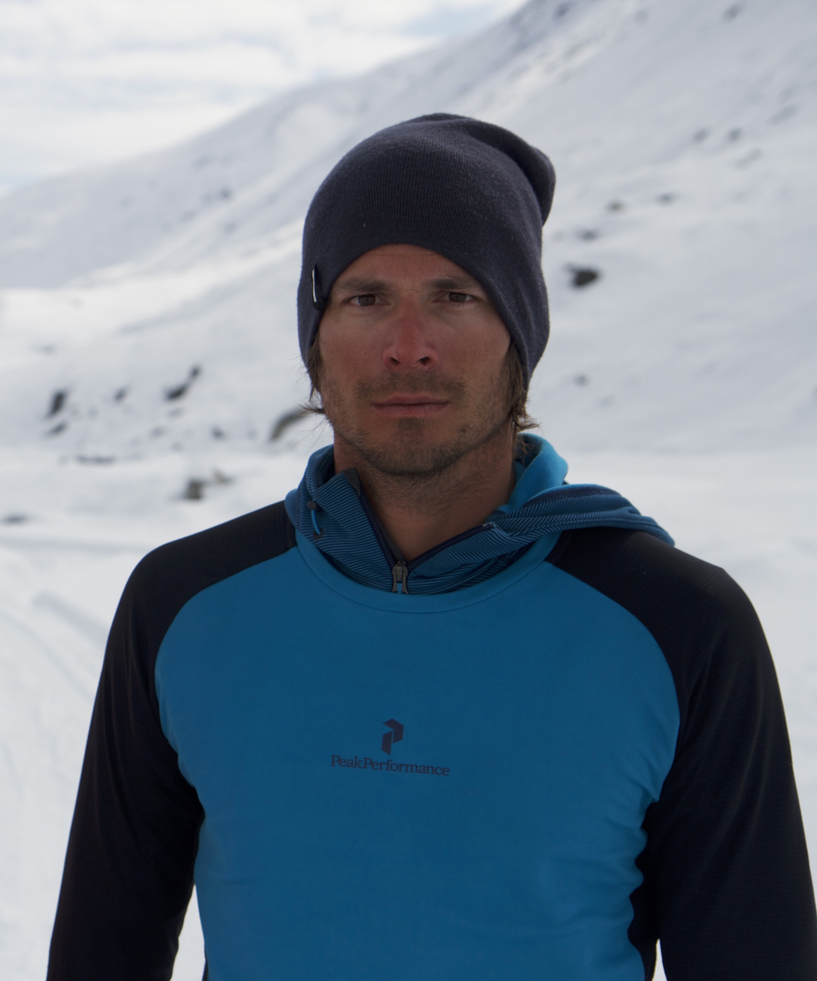 Sibirien